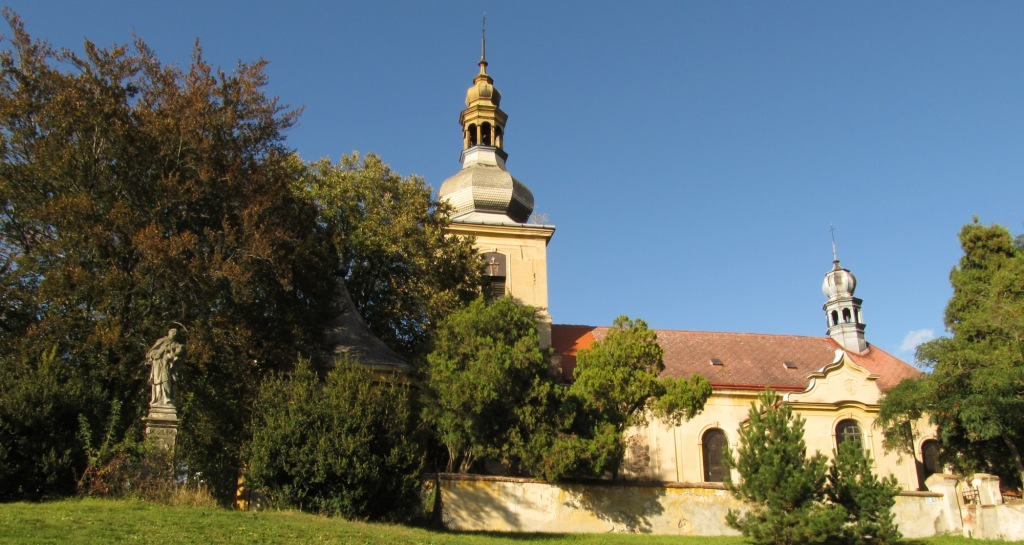 Kostel narození panny Marie - Buškovice